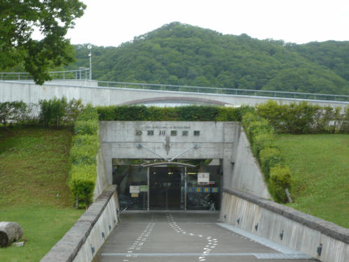 沙流川歴史館